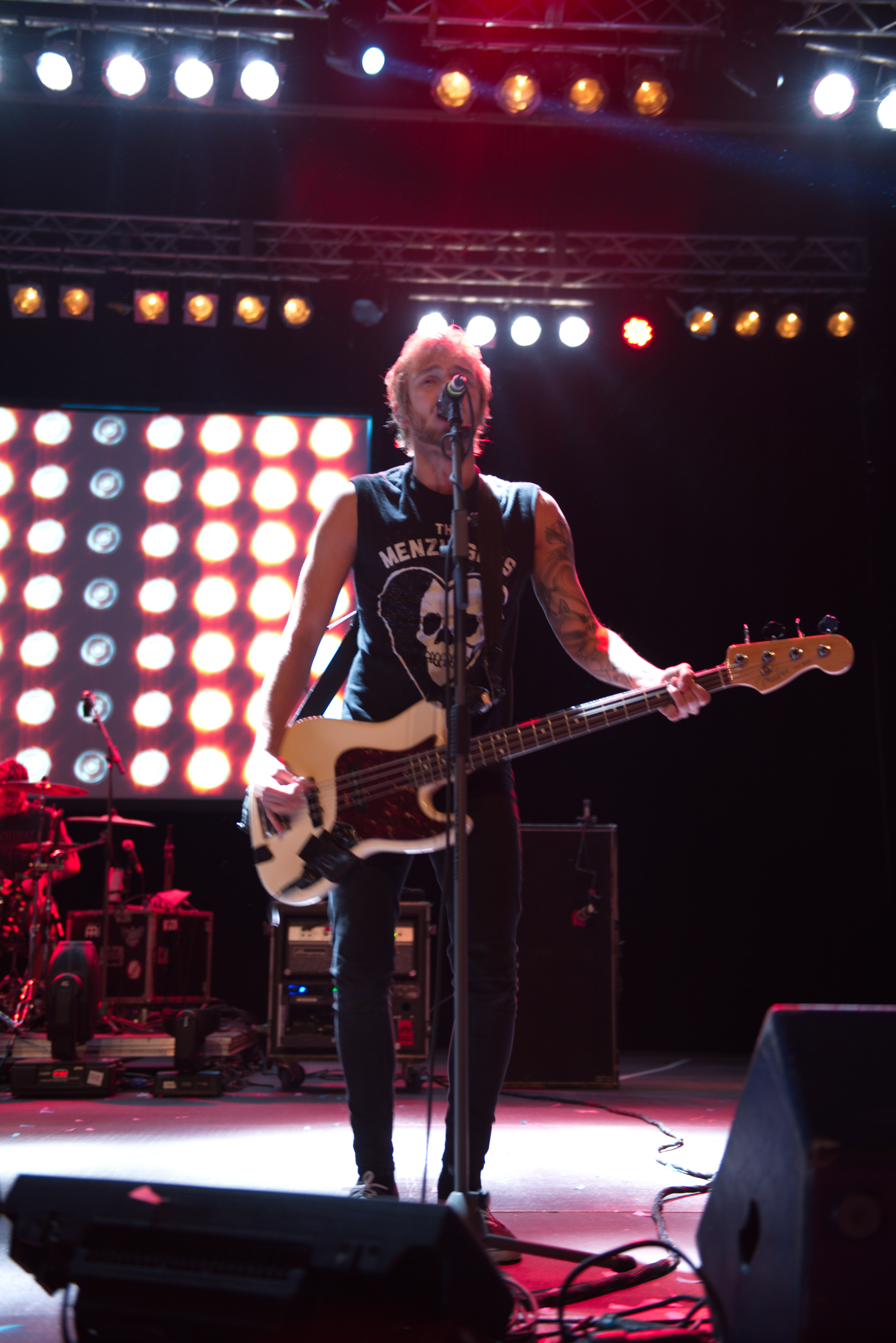 Itchy Poopzkid beim Schüler-Rockfestival 2016